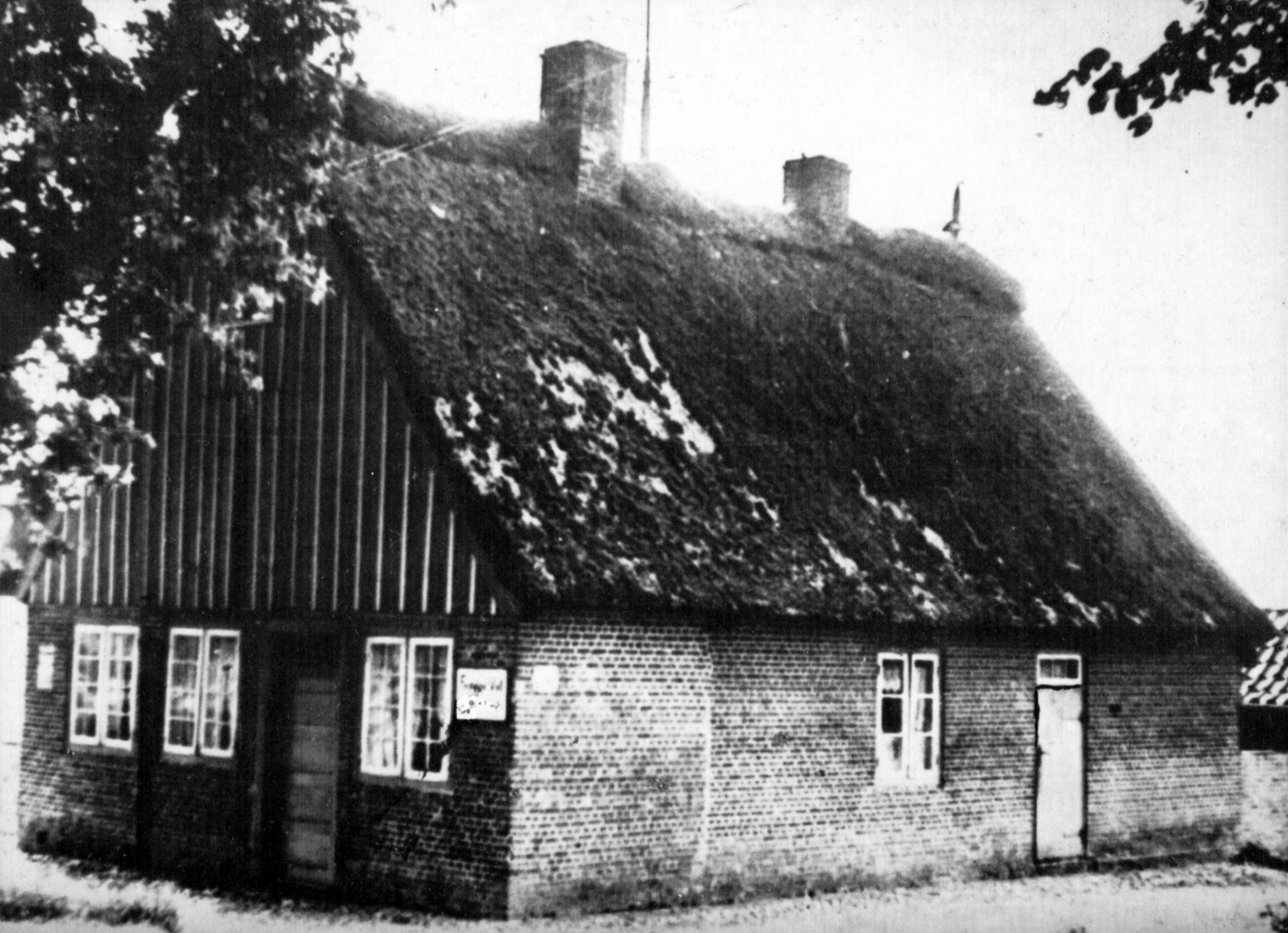 Das ehemalige Schulhaus in Klevendeich, Geburtsort von Detlef Detlefsen (1833-1911) und Wirksätte des Walfängers, Schulmeisters und Sparkassenrendanten Jacob Thormählen (1828-1904).